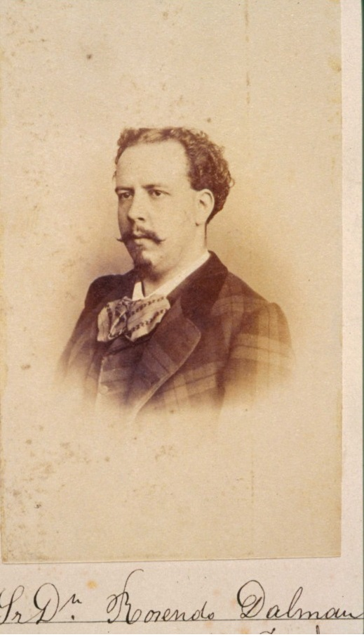 Rosend Dalmau